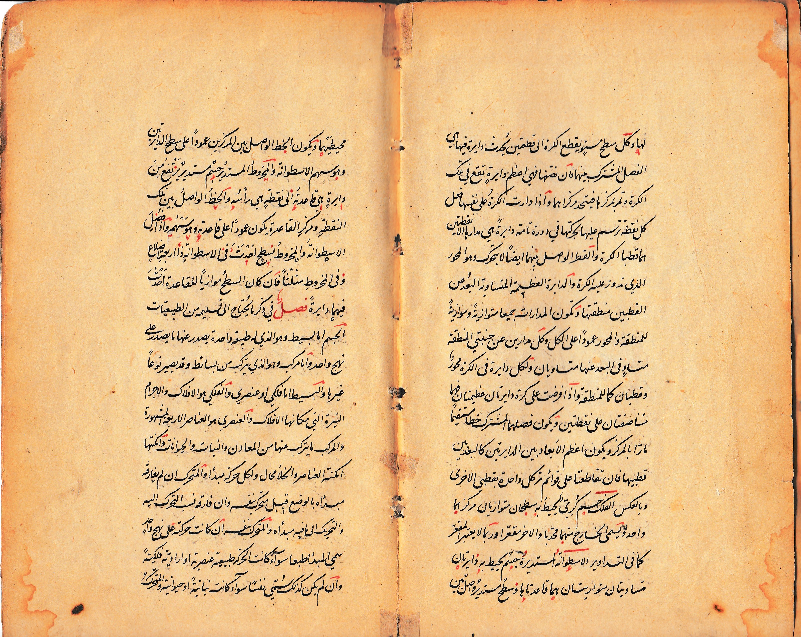 الصفحة الثانية من مقدمة كتاب (تشريح الأفلاك) في علم الهيئة، من تأليف بهاء الدين العاملي وعلى غلاف الكتاب ختم واهداء الشيخ نعمان خير الدين الآلوسي إلى استاذهِ وشيخه ملا قاسم أفندي المفتي عام 1273هجري/ 1856م، في بغداد